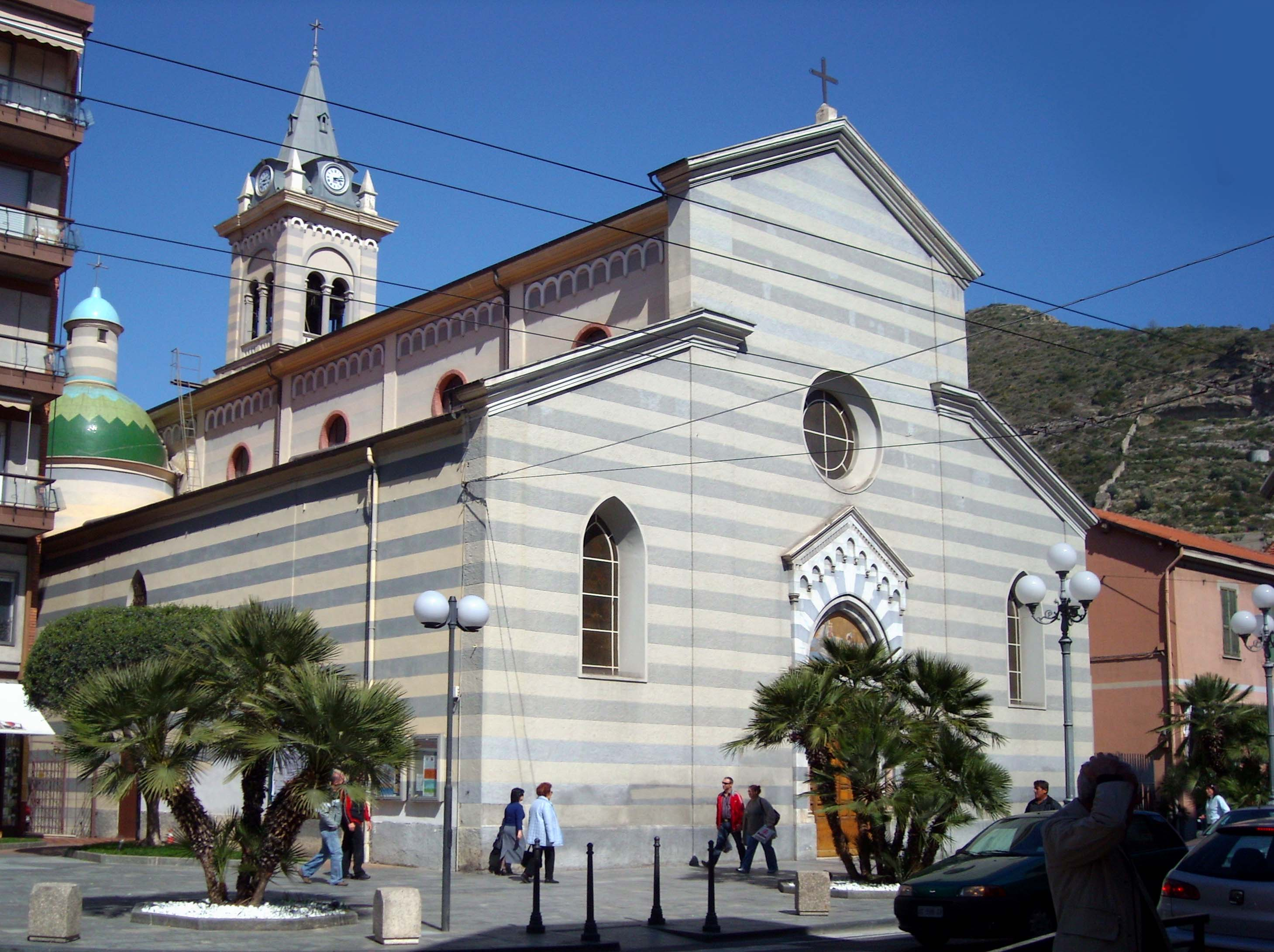 La chiesa parrochiale di san Agostino in Ventimiglia